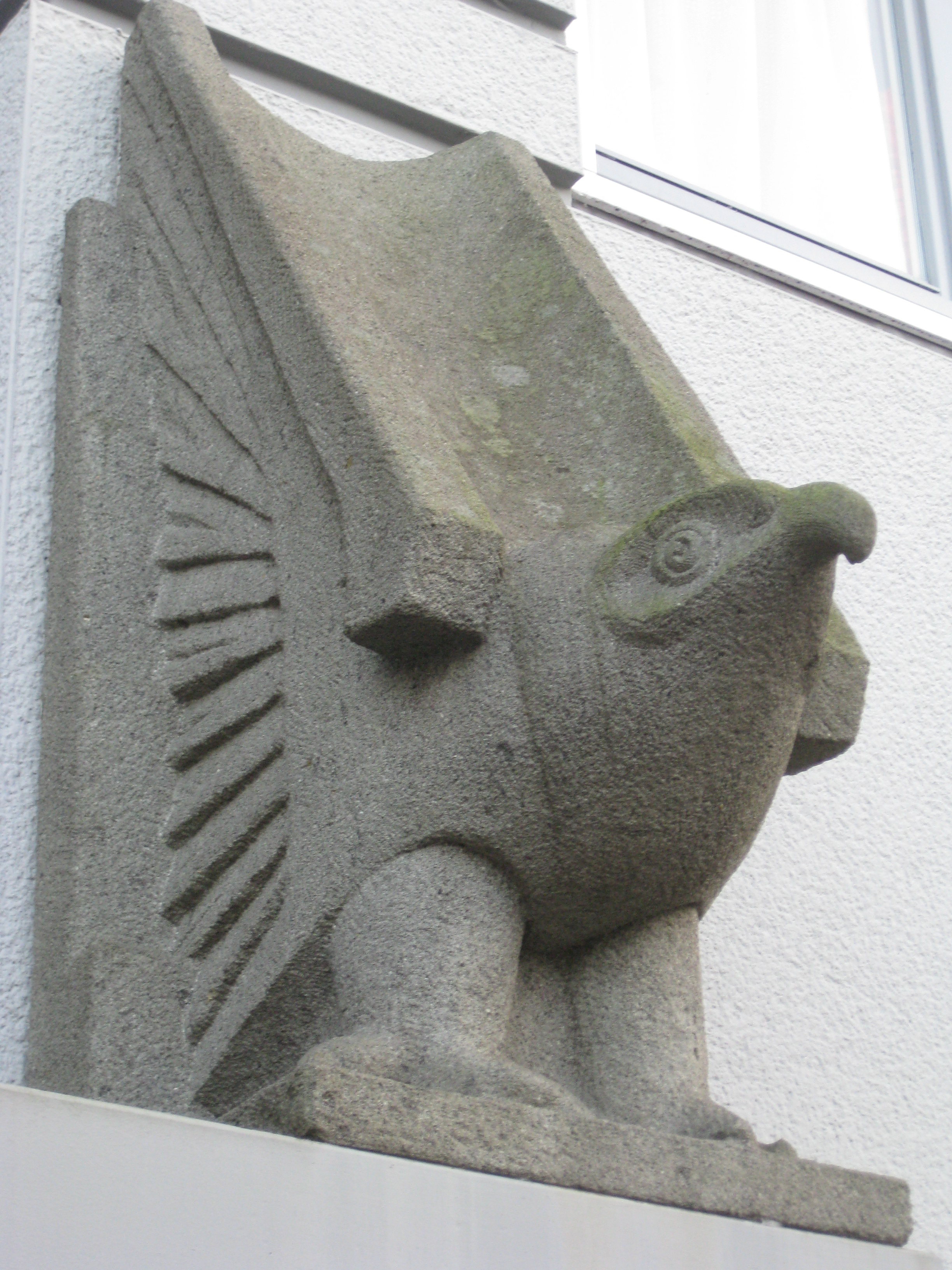 Adelaar in de Veeteeltstraat in Amsterdam-Oost (Betondorp)